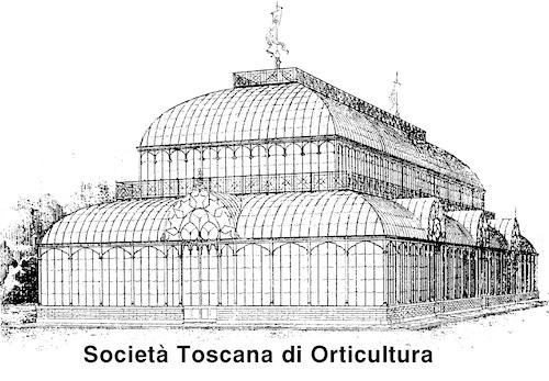 Tepidario di Giacomo Roster, attualmente a Firenze nel giardino dell'orticoltura, usato come logo della Società Toscana di Orticultura